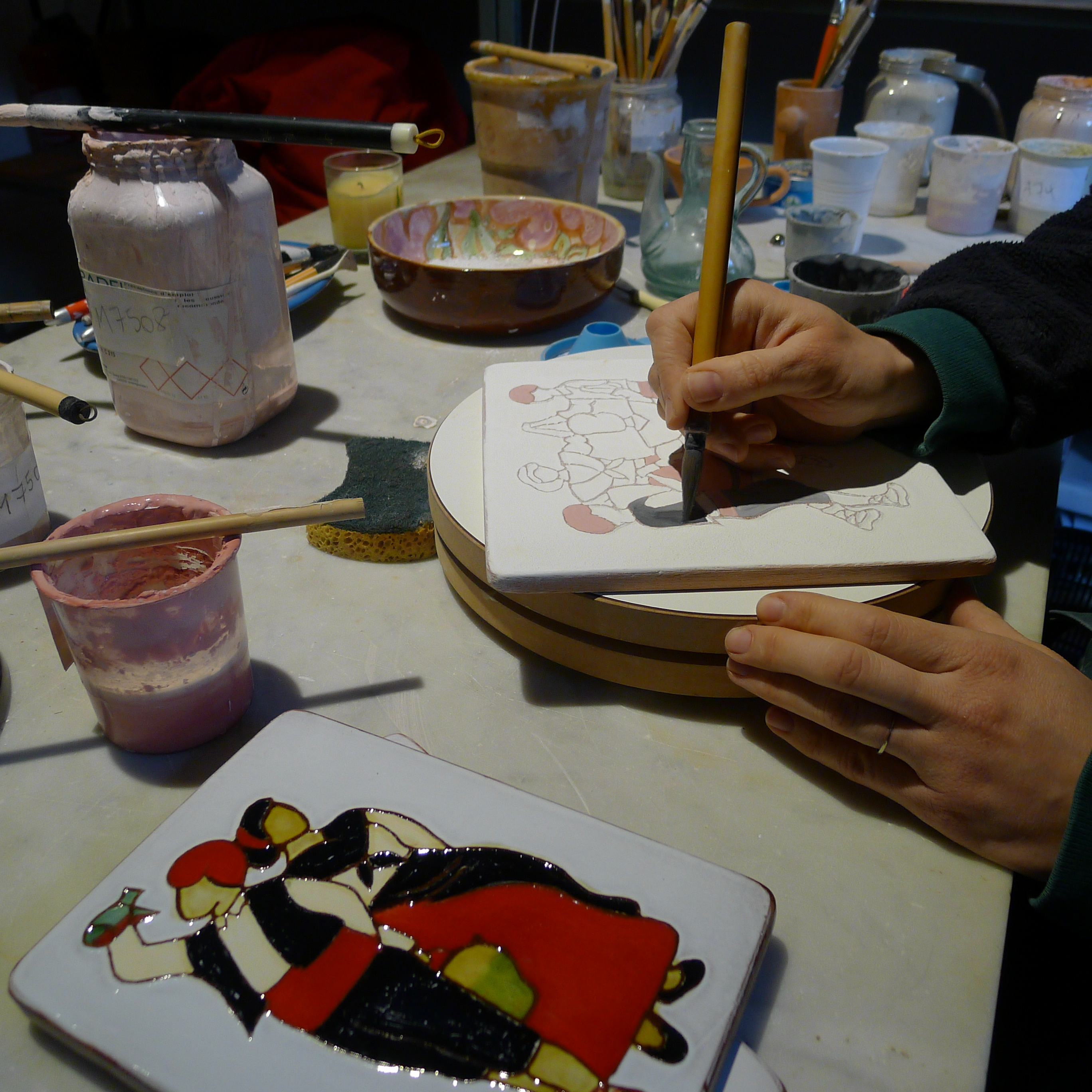 Création d'une céramique dans l'atelier Sant Vicens